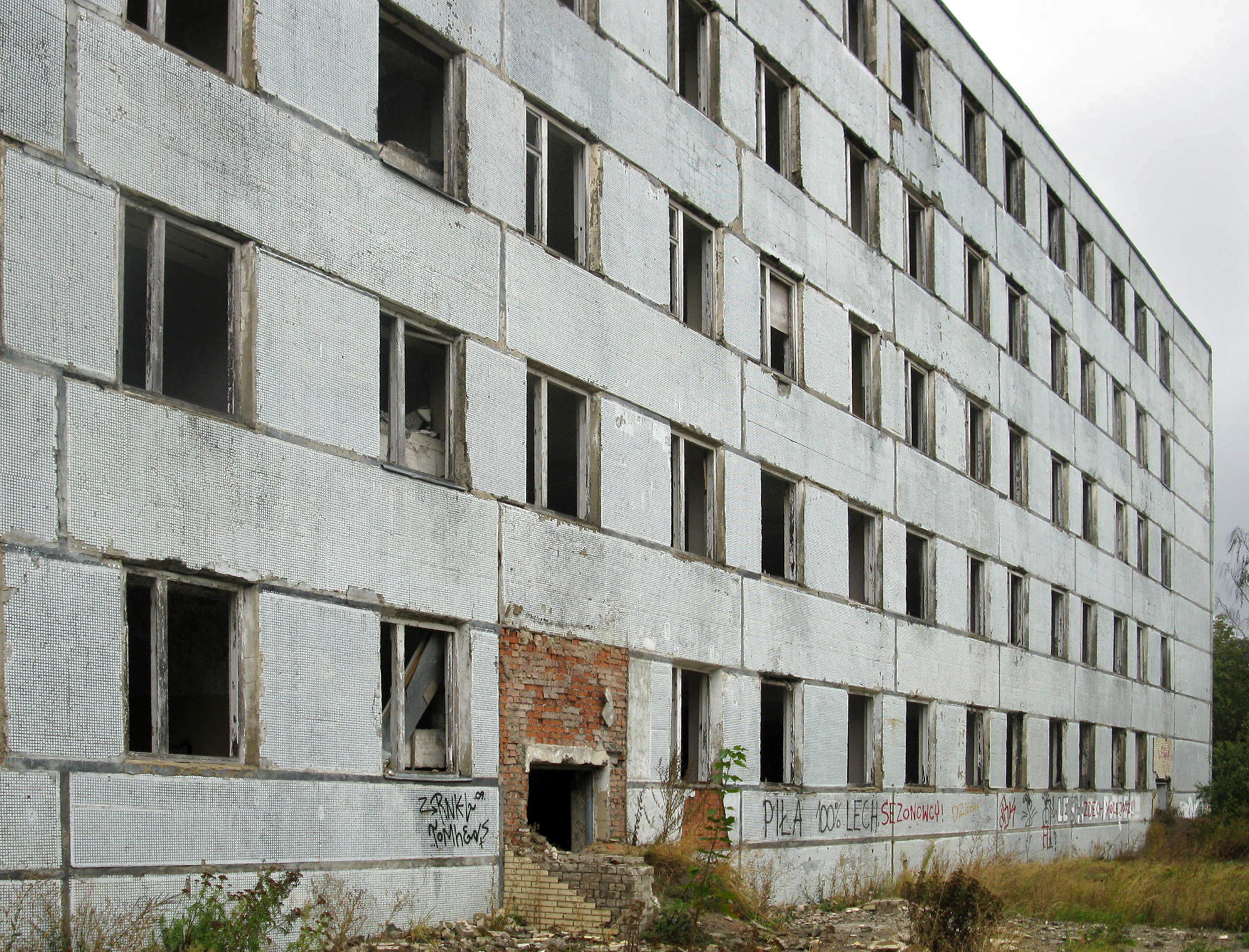 Kłomino - opuszczone osiedle